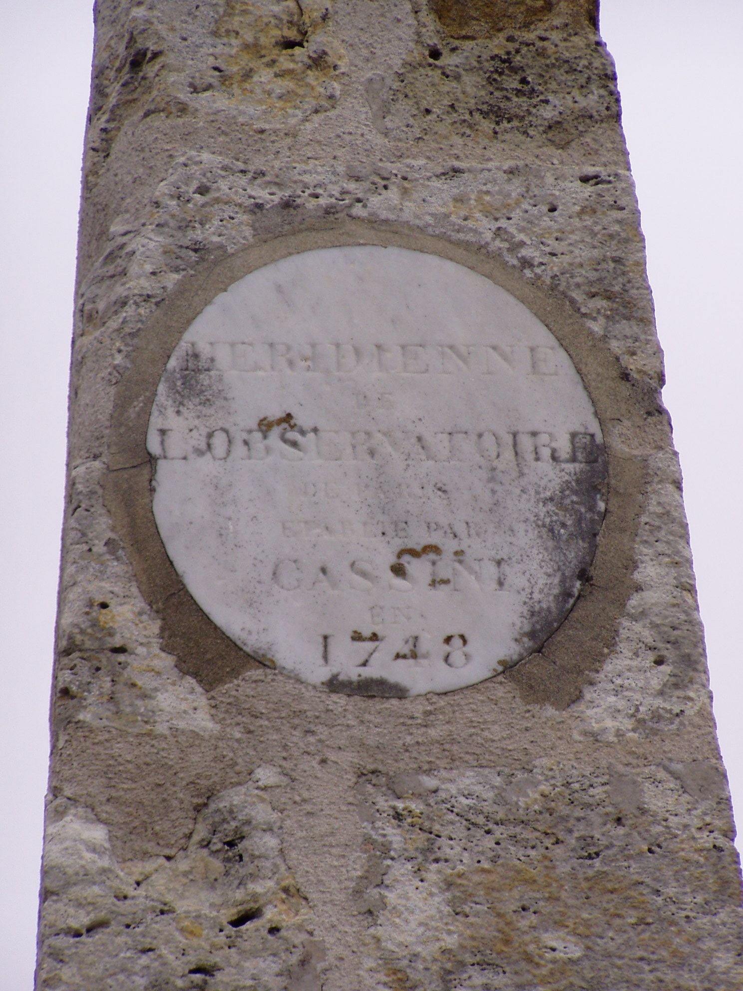 Détail du monument signalant le méridien de Paris à Manchecourt (Loiret) France